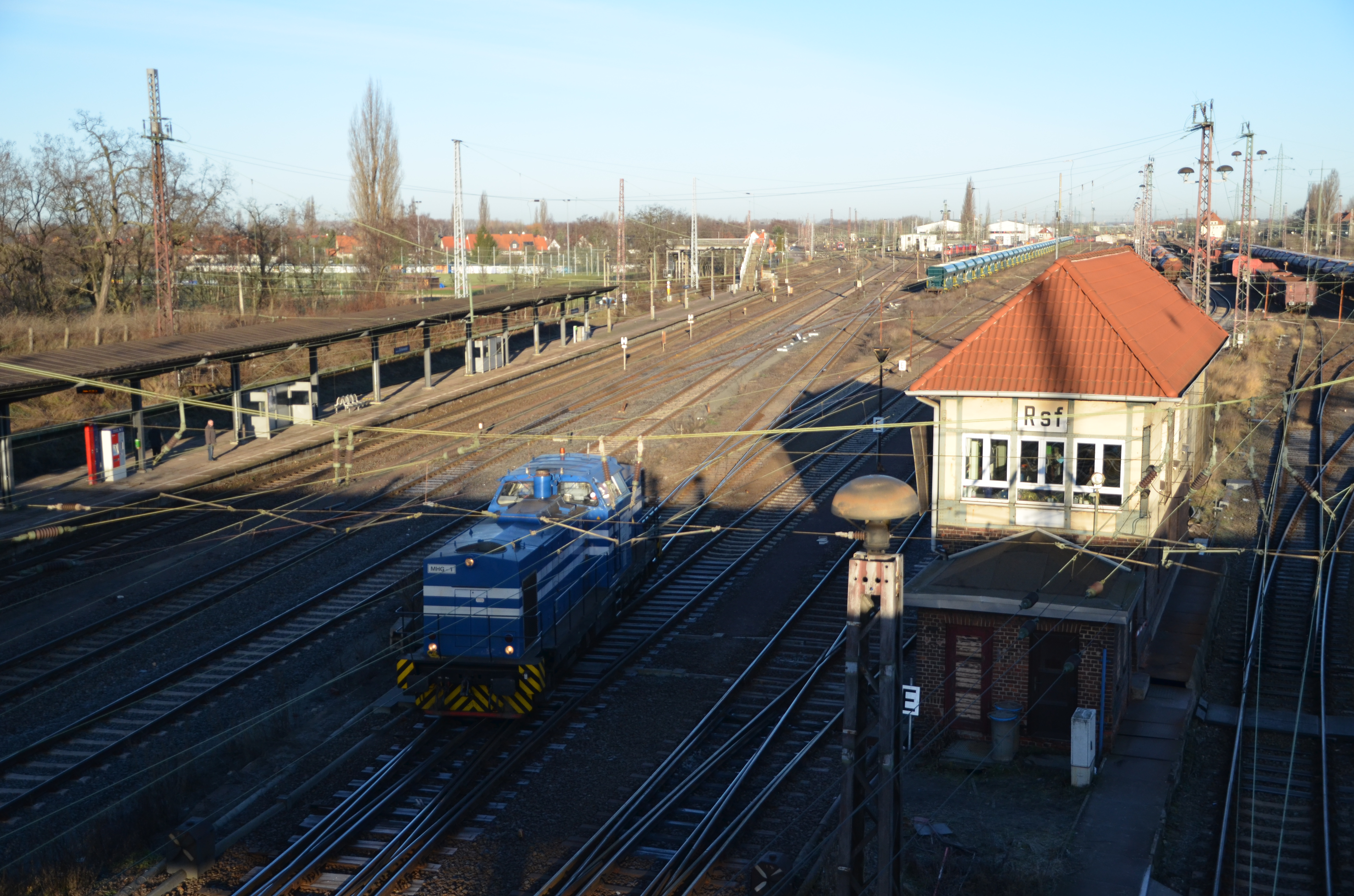 MHG Lok 1 am Bf. Magdeburg-Eichenweiler